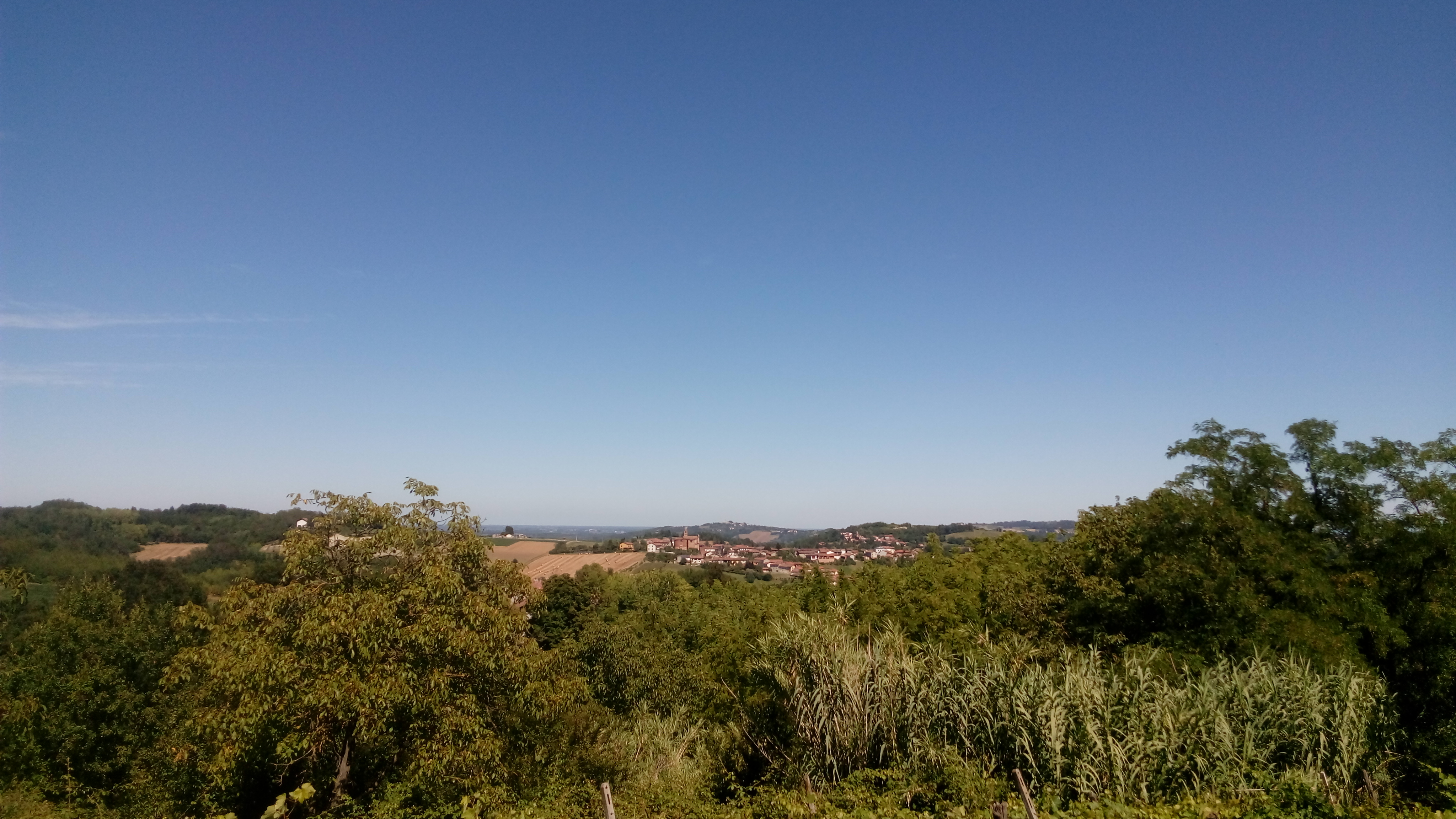 panorama su Solonghello